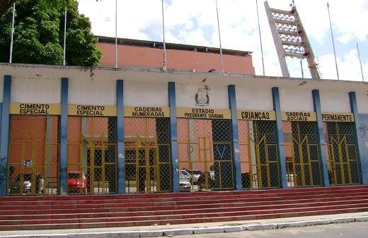 Estádio Presidente Vargas. Fortaleza, Ceará, Brasil.